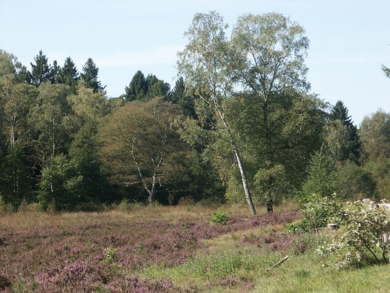 Büsenbachtal (Gemeinde Handeloh, Lüneburger Heide)